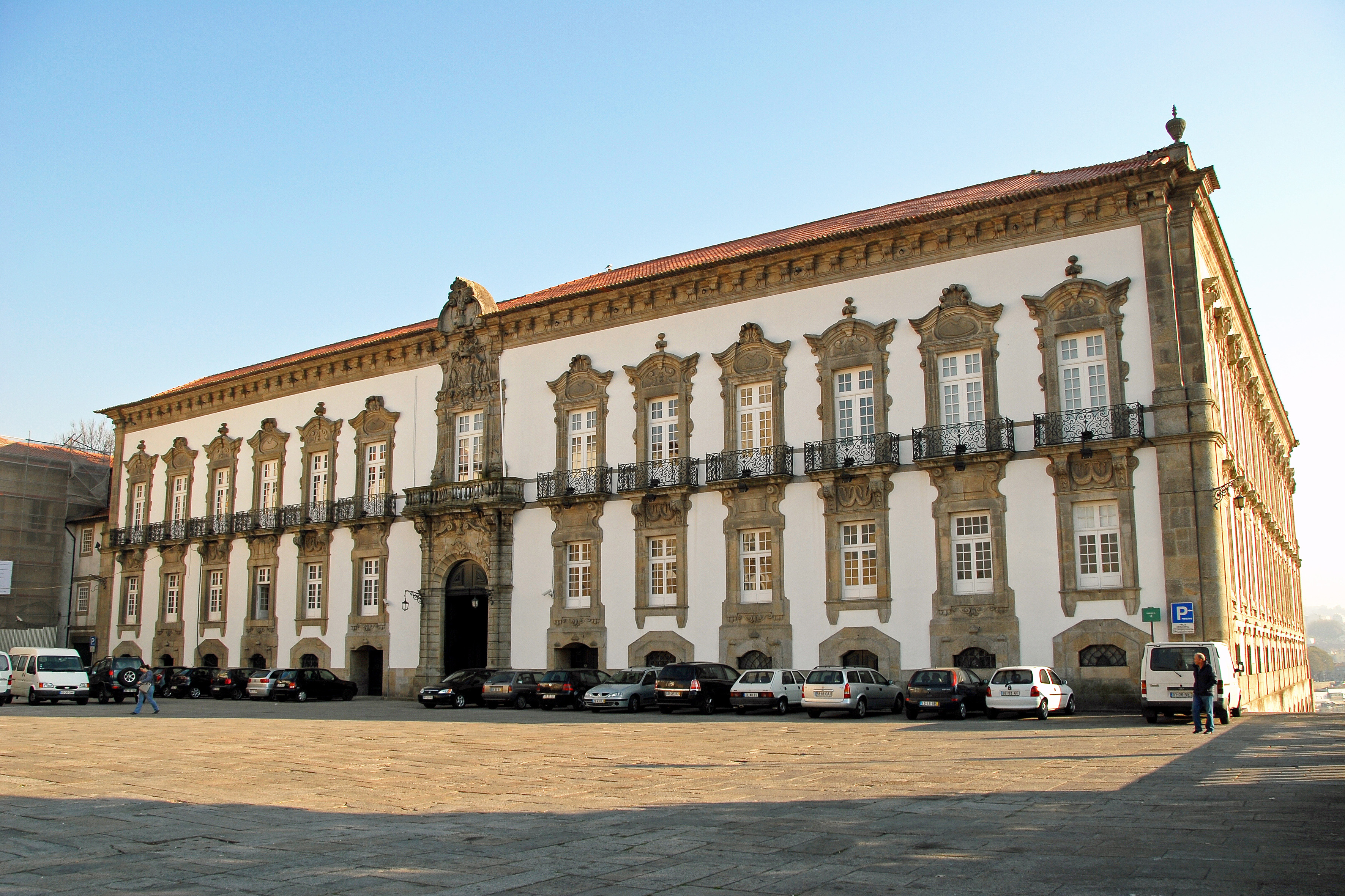 Palácio Episcopal This file was uploaded for Wiki Loves Monuments in Portugal with the unique identifier 70404.